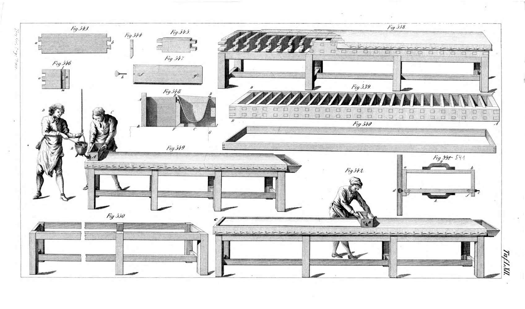 Tafel aus Johann Gottlob Töpfer: Atlas zum Lehrbuch der Orgelbaukunst, Weimar 1855Tafel 62